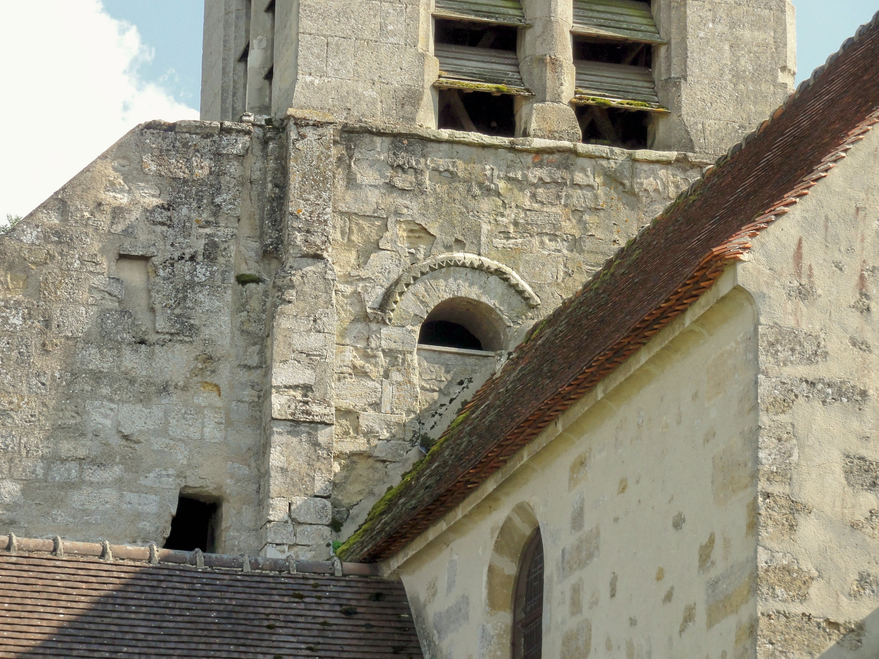 Premier étage du clocher côté ouest : fenêtre romane.